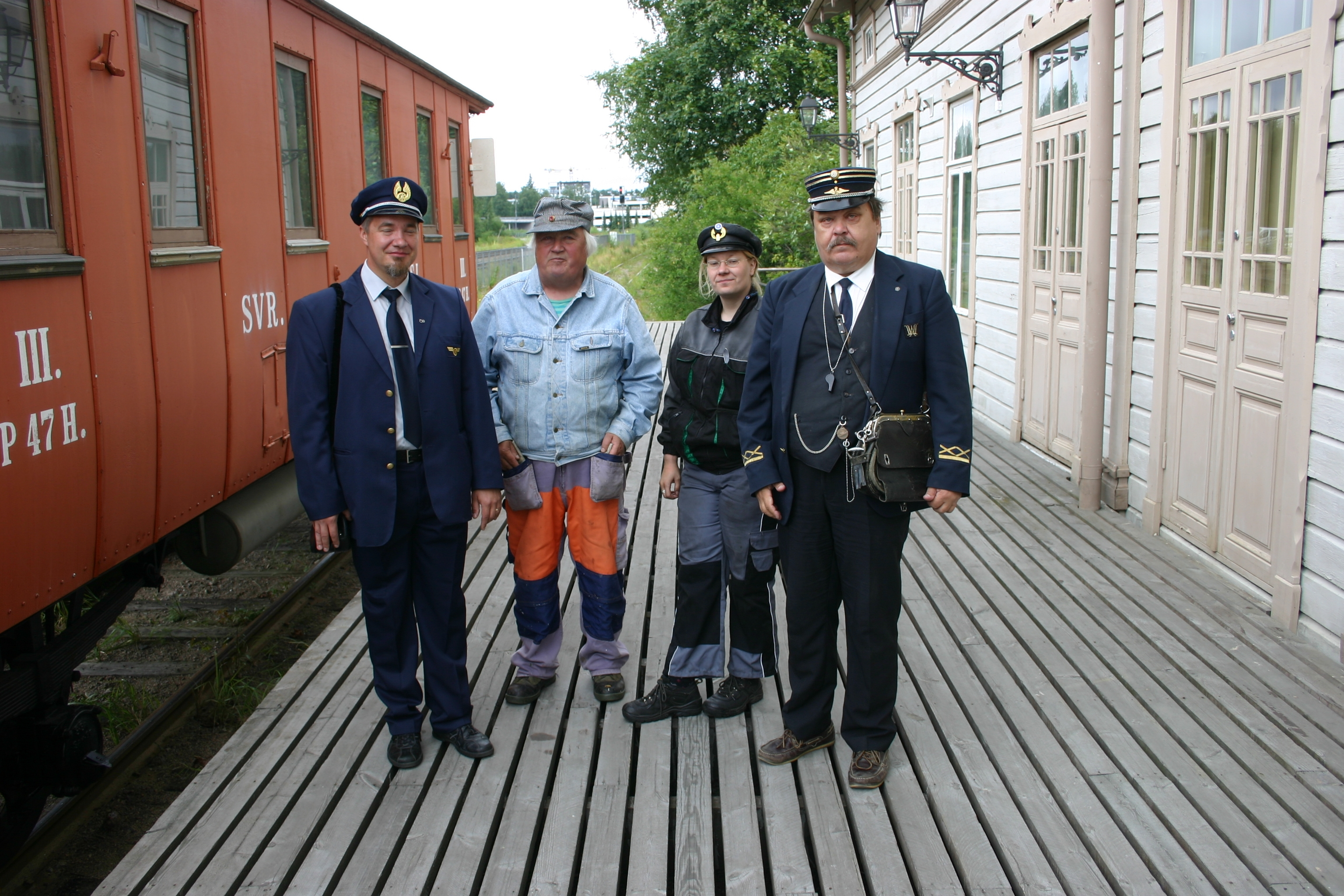 Rautatiemuseon työntekijöitä, osin talkoolaisia, puistojunan äärellä